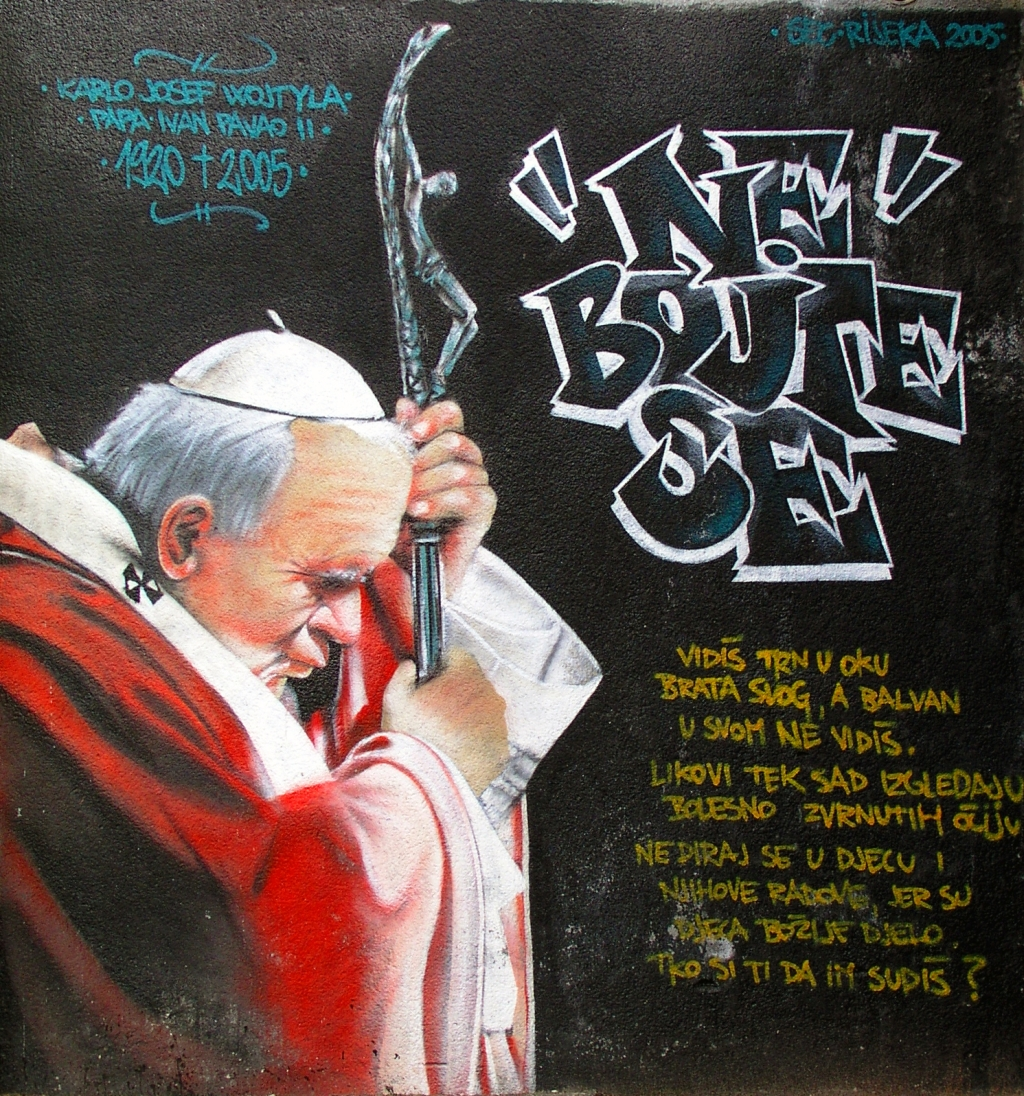 Ivan Pavao II., grafiti u Rijeci (Mrtvi kanal)